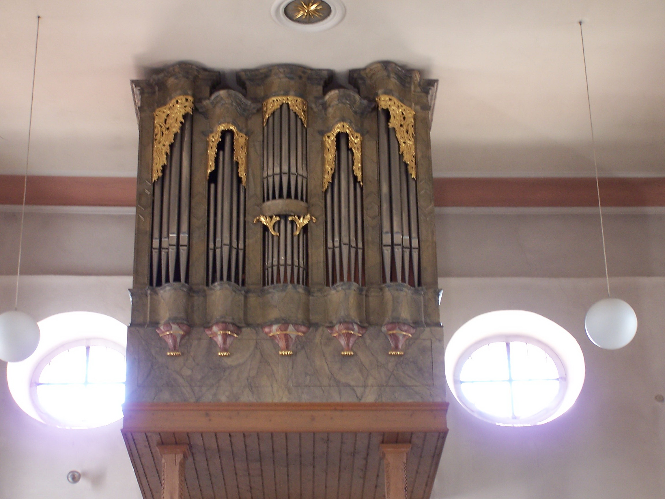 Sandsbach, Am Kirchberg 3; Am Kirchberg 2. Katholische Pfarrkirche St. Petrus. Die Orgel aus dem Jahr 1983 steht auf zwei Säulen und reicht bis zur Decke.